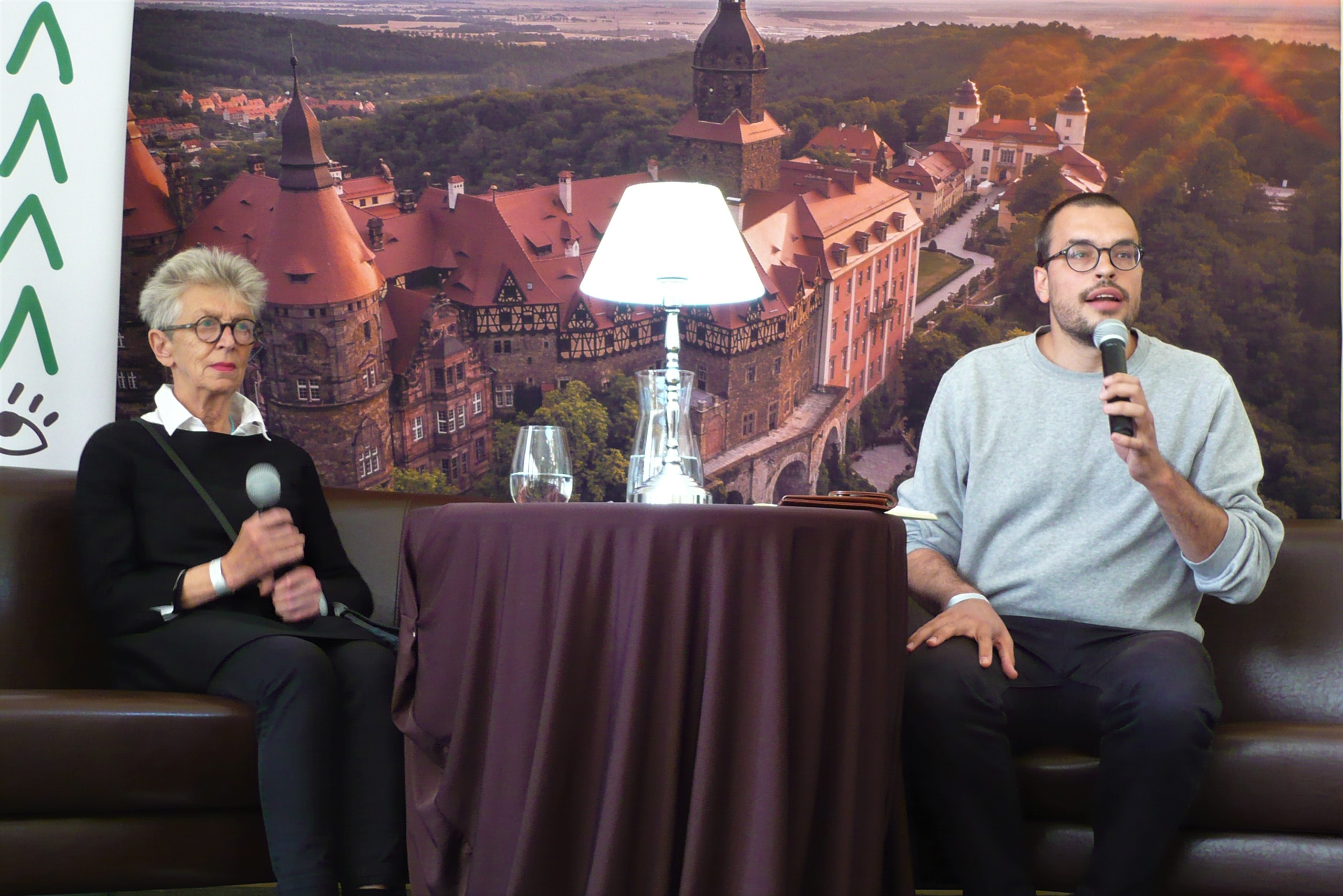 Anda Rottenberg, VI Festiwal Góry Literatury, Zamek Książ, 2020